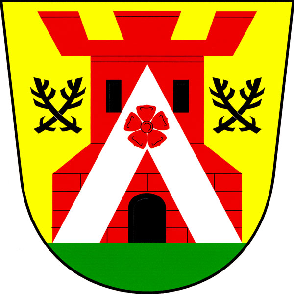 Znak obce Střemy